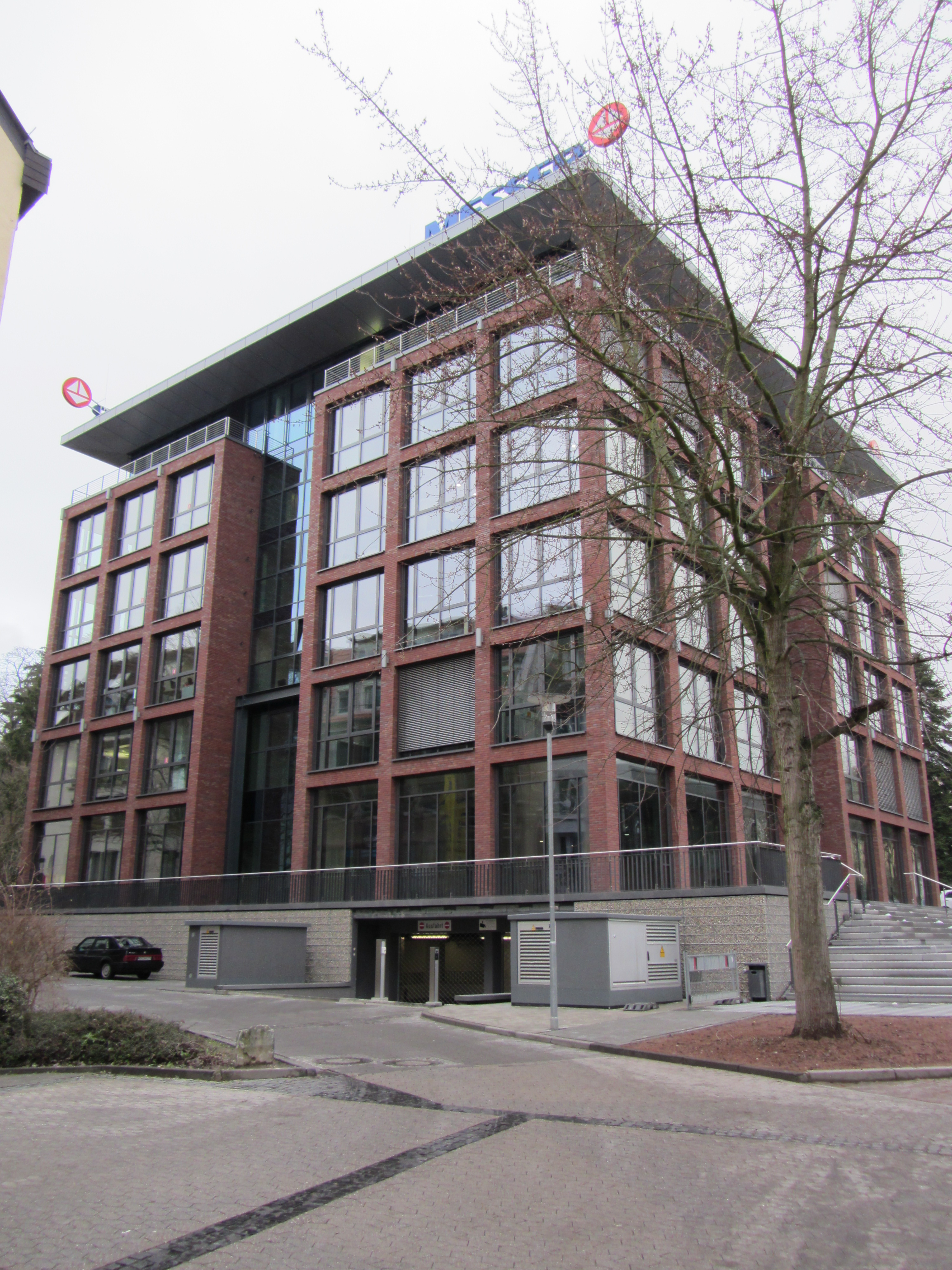 Hauptsitz der Messer Ag in Bad Soden